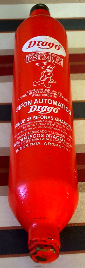 es una garra de anidrido carbonico